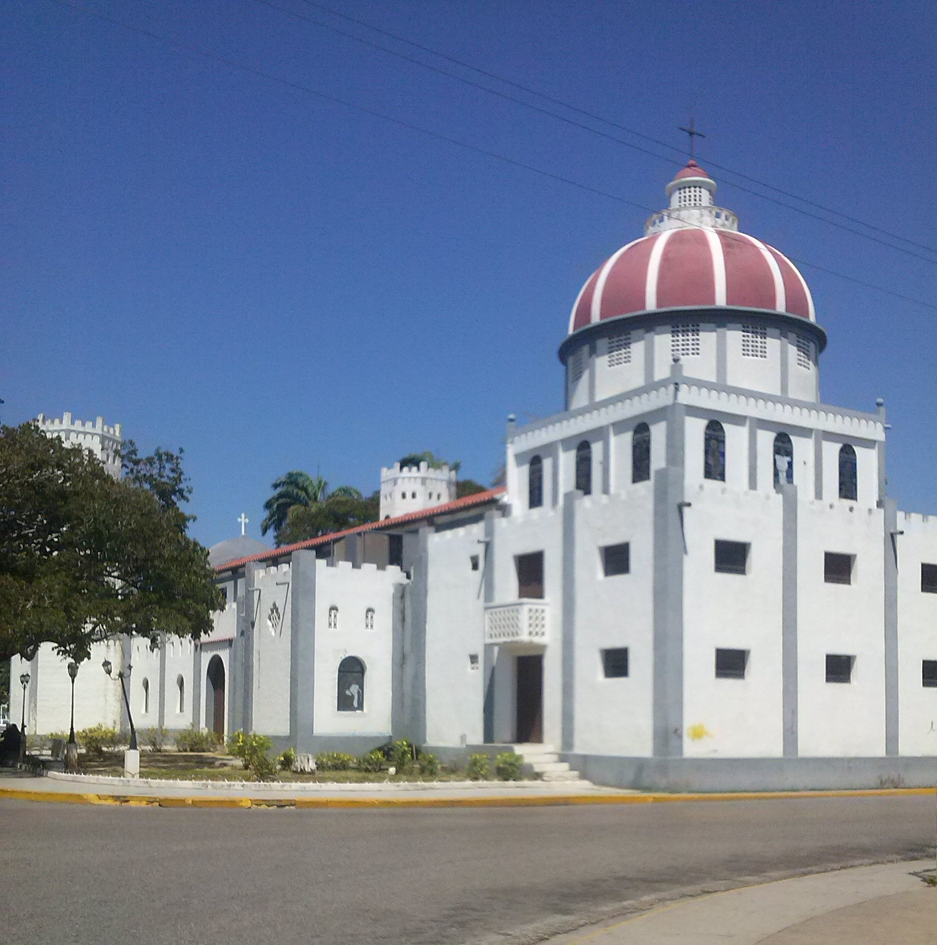 Iglesia principal de Cariaco